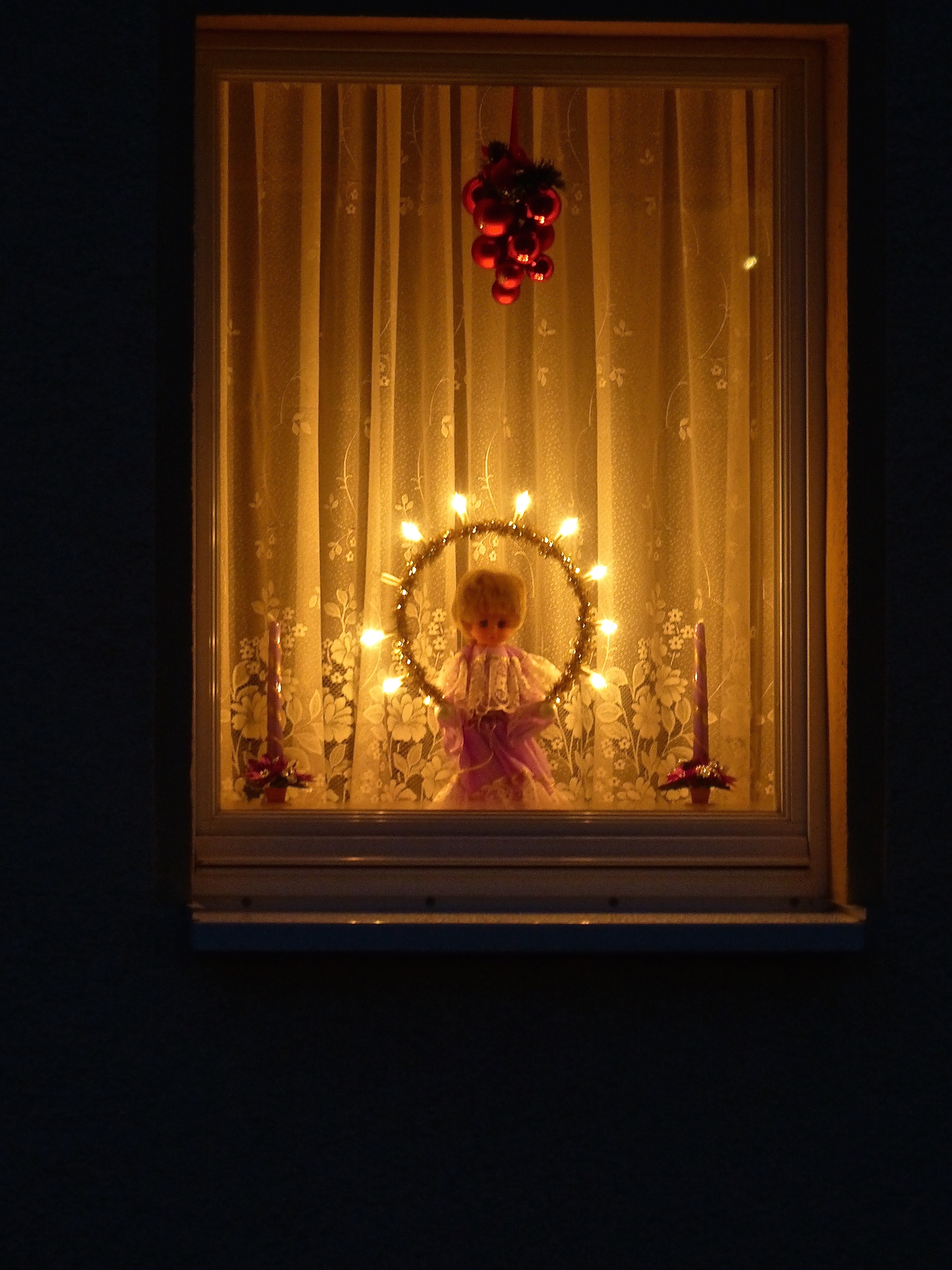 Pobershau: Lichterengel